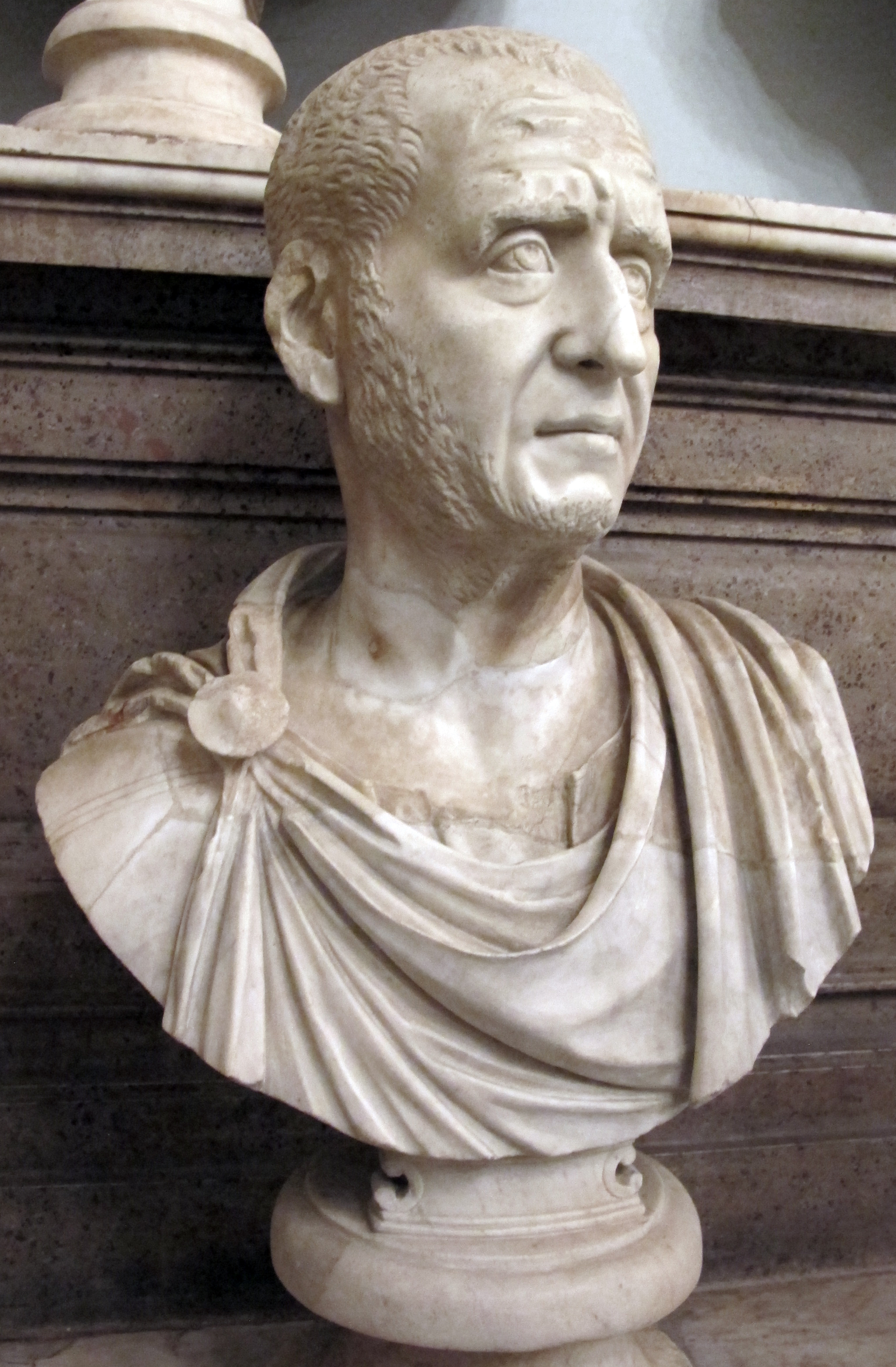 Musei Capitolini